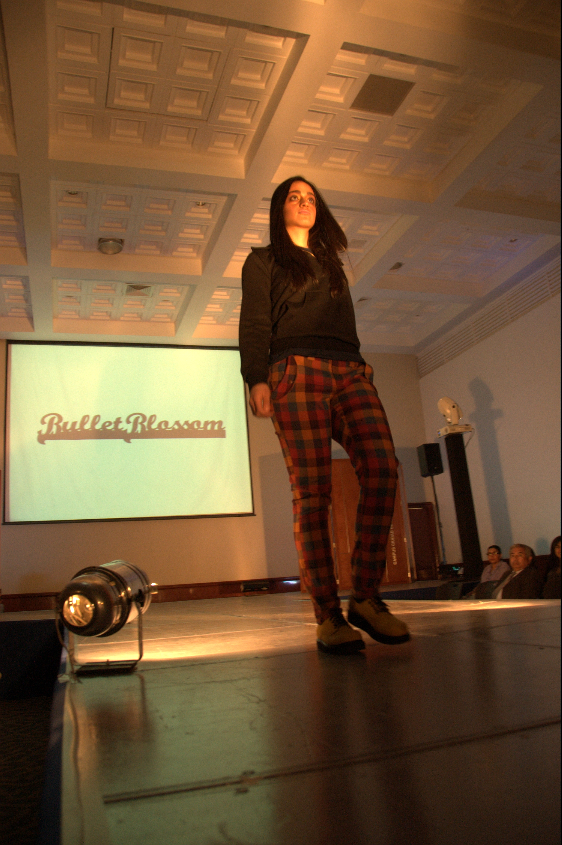 modelo presentando ropa de Bullet Blossom en pasarela de ITESM CCM